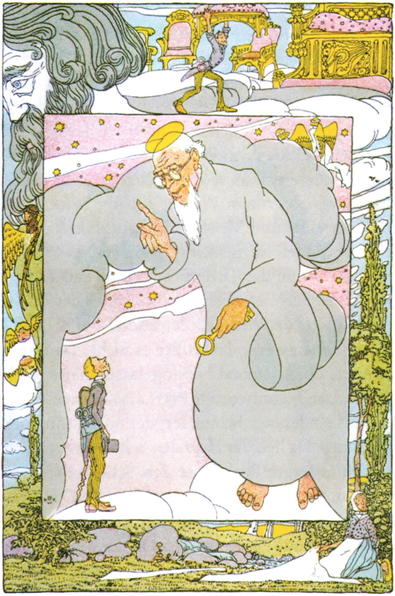 Illustration des Grimm'schen Märchens „Der Schneider im Himmel“ (KHM 35) von Heinrich Vogeler